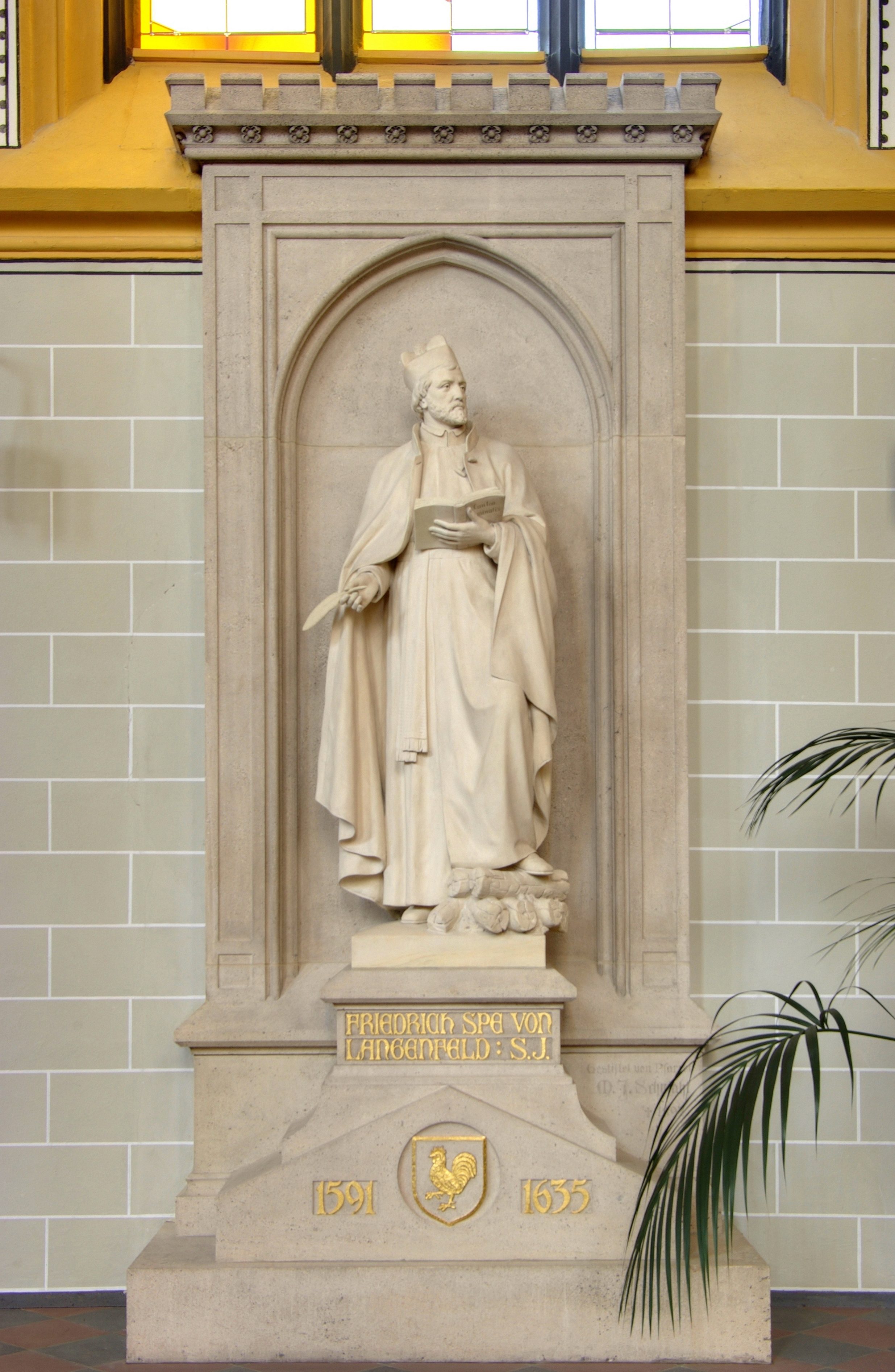 Jesuitenkirche, Trier, Deutschland. Südschiff: Statue (1907) Friedrich Spee (1591-1635) von Wilhelm Albermann (1835-1913)